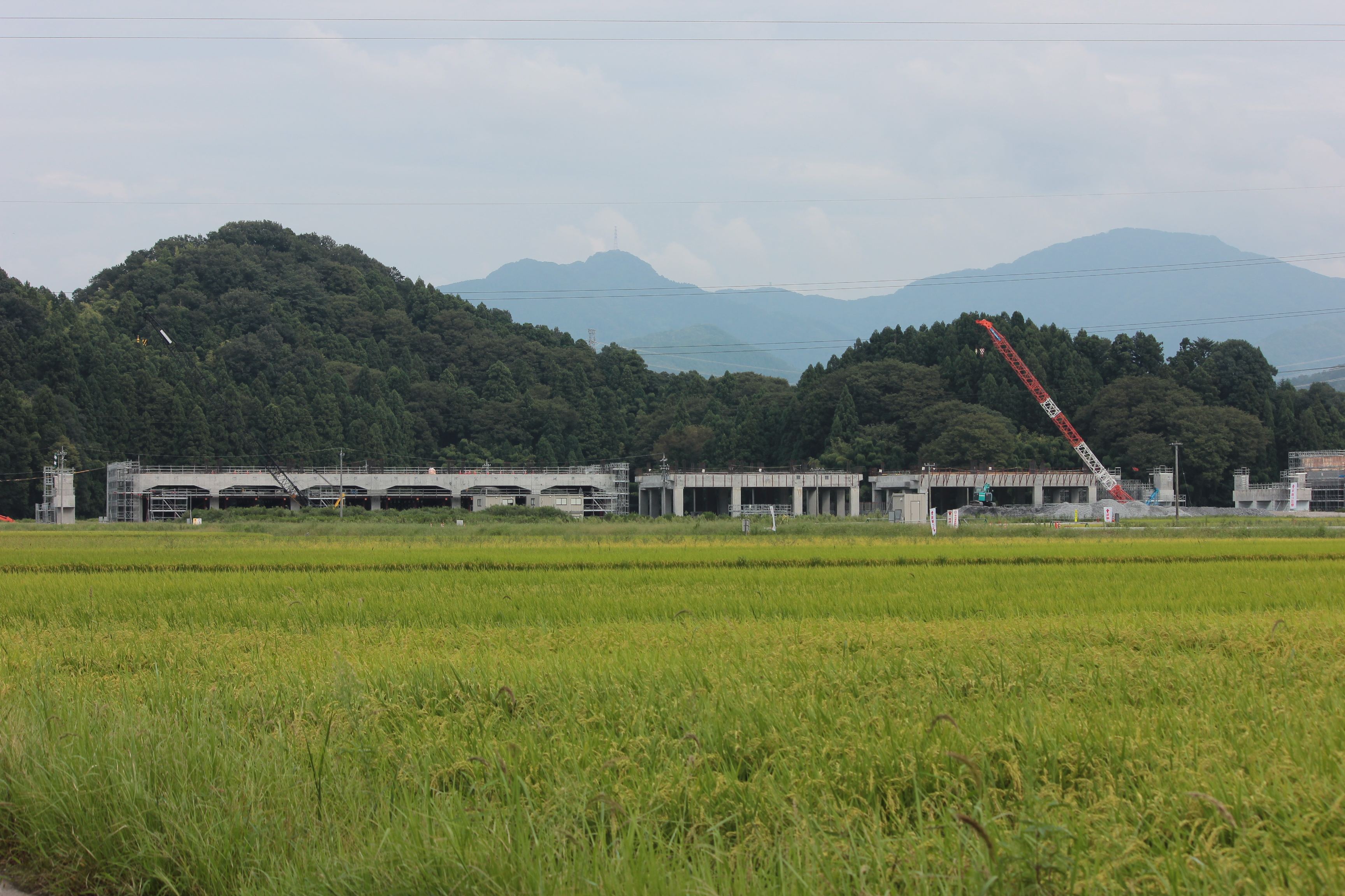 北陸新幹線南越駅建設光景（福井県越前市） Canon EOS Kiss X5